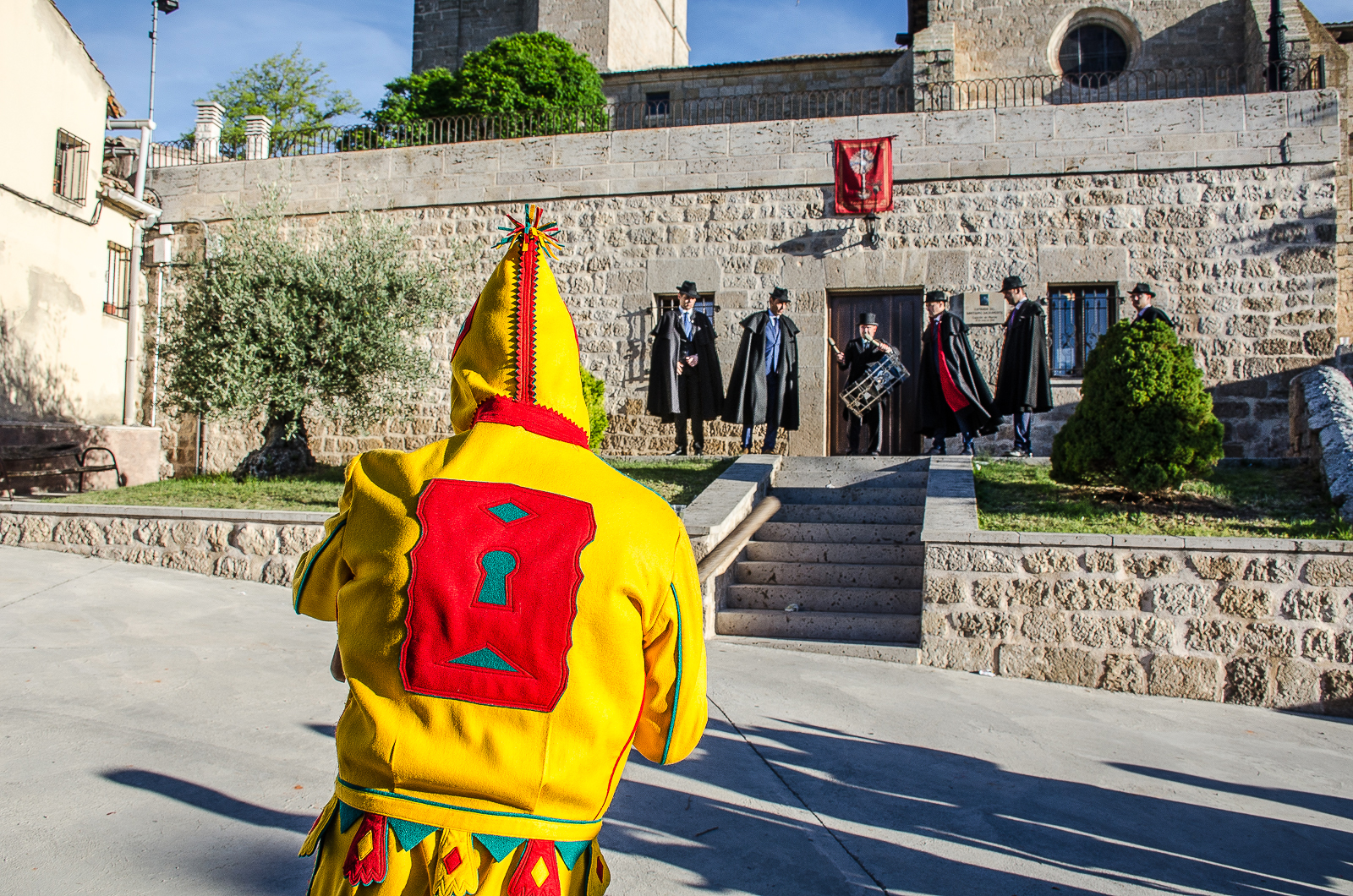 El Colacho frente a la Cofradía del Santísimo Sacramento, con su atabalero, de Castrillo de Murcia, antes de empezar su recorrido por el pueblo.